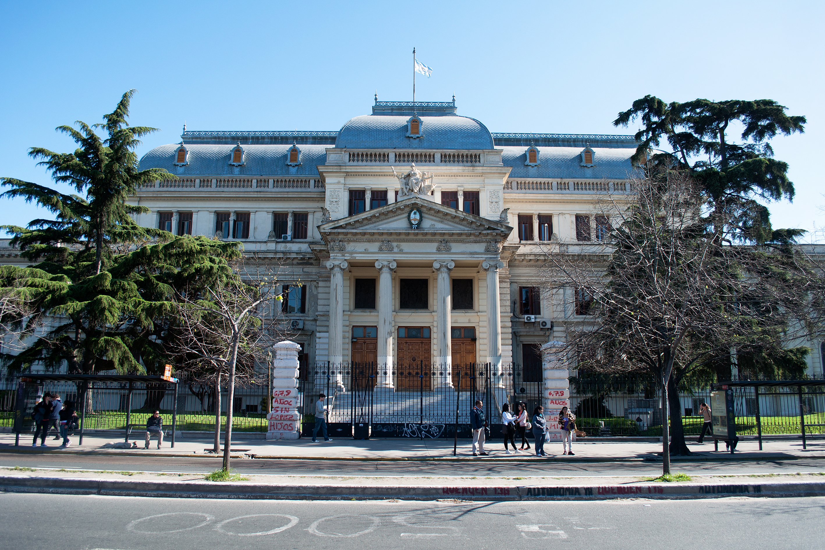 Palacio Legislativo, entrada sobre la calle 7